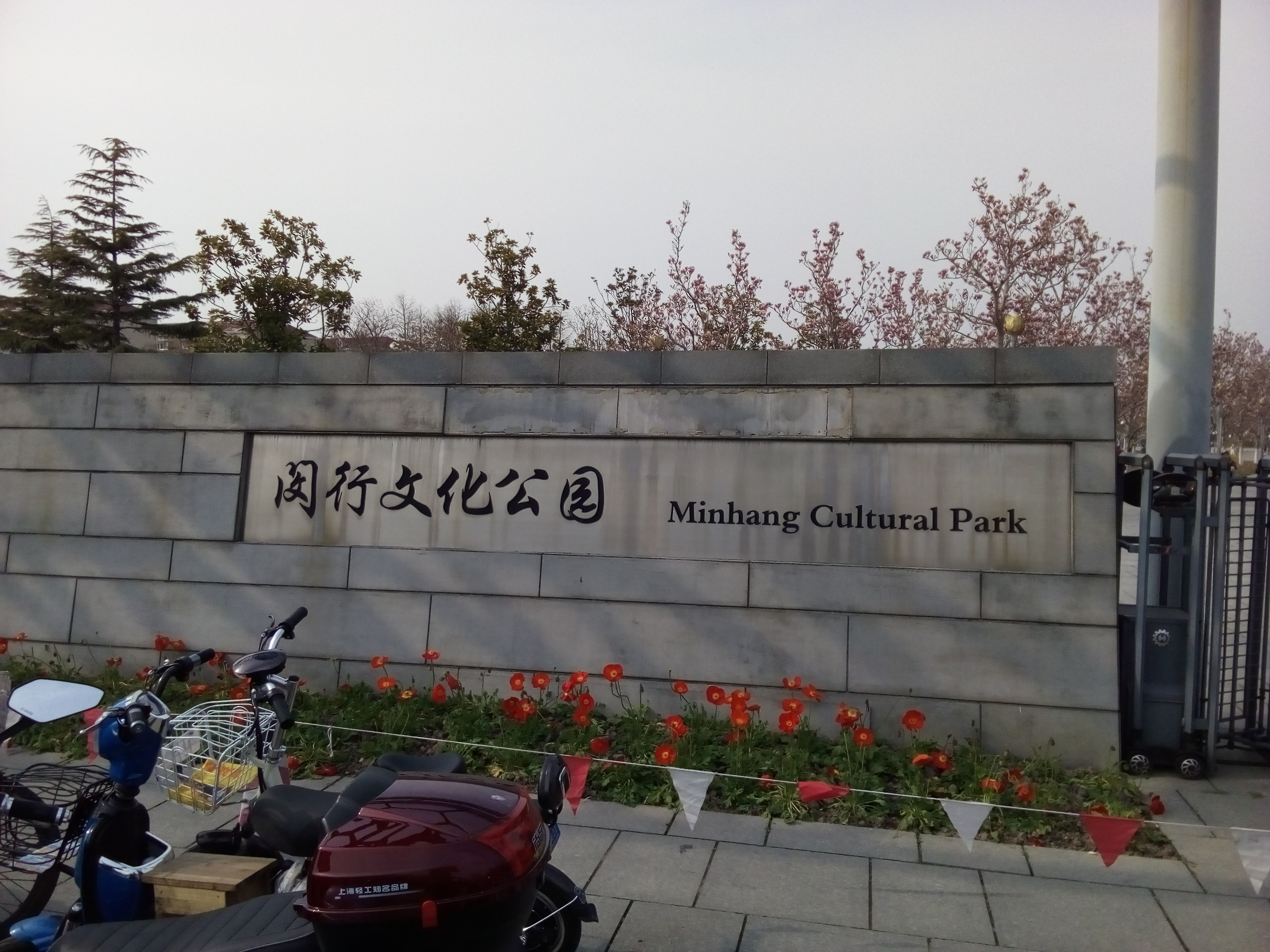 闵行文化公园南大门